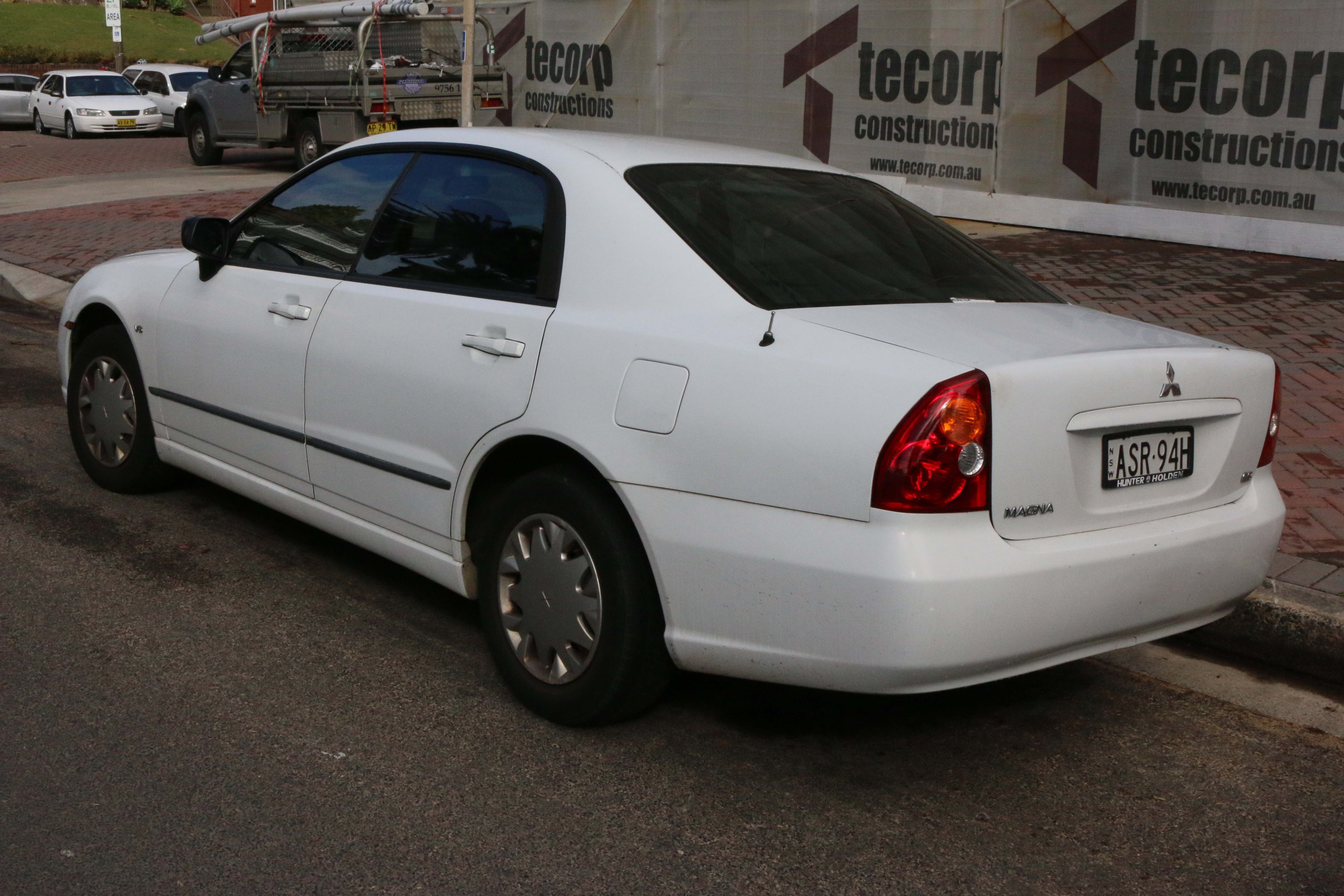 Mitsubishi Magna TL ES